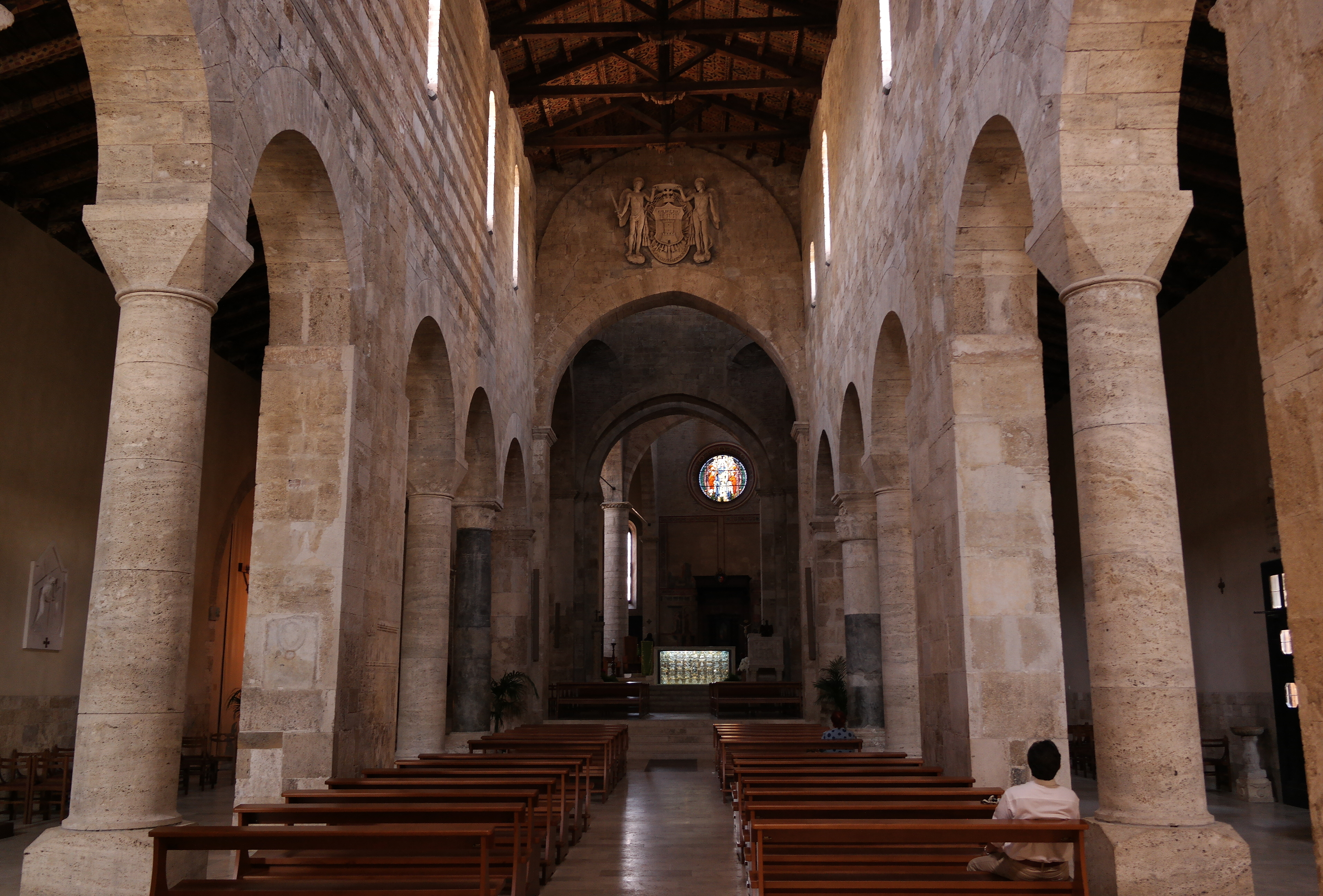 Interno del Duomo di Teramo